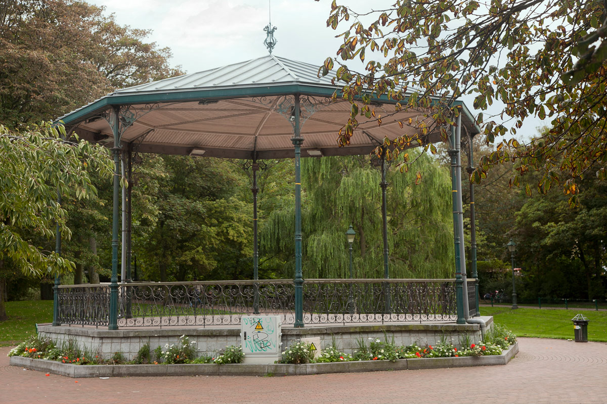 De kiosk in het leopoldpark